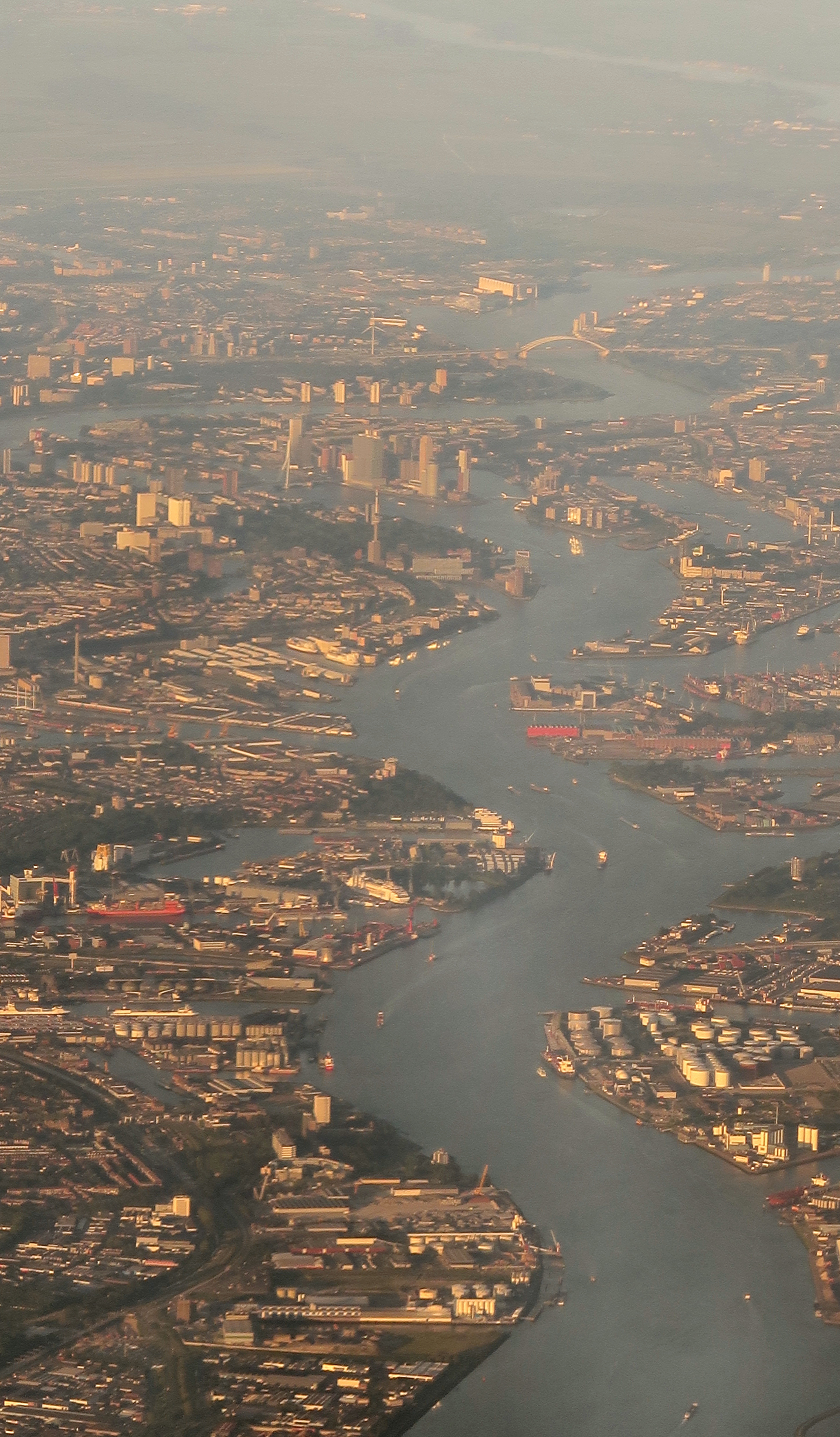 De Nieuwe Maas, gezien naar het oosten.